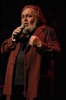 Richard Anthony pendant la tournée Age tendre